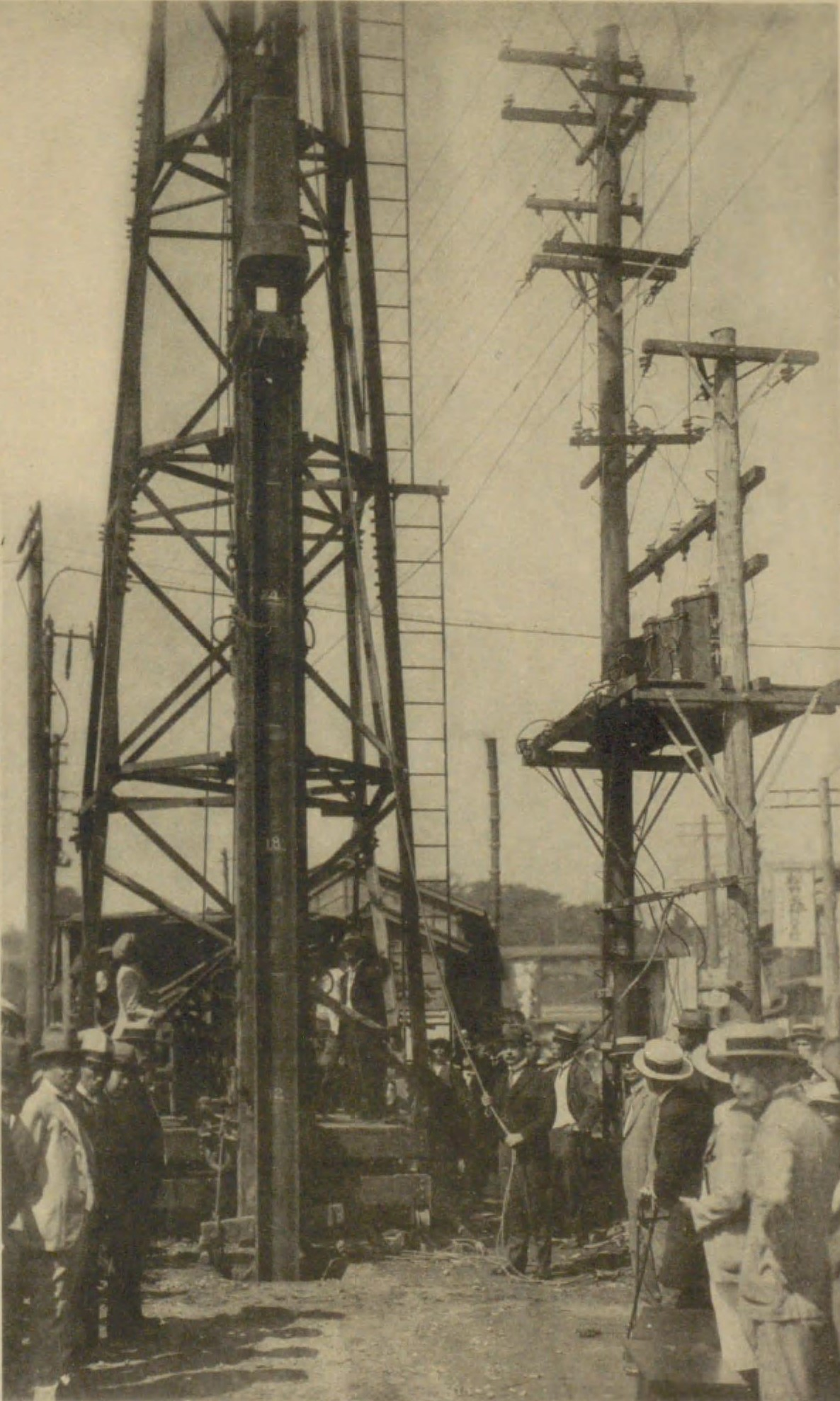 1925年（大正14年）9月27日午前10時より挙行された東京地下鉄道（現・東京地下鉄）銀座線上野浅草間の起工式。杭打の綱を握るのは早川徳次。